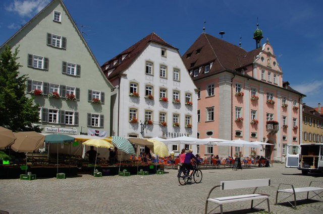 Rottenburg - Marktplatz